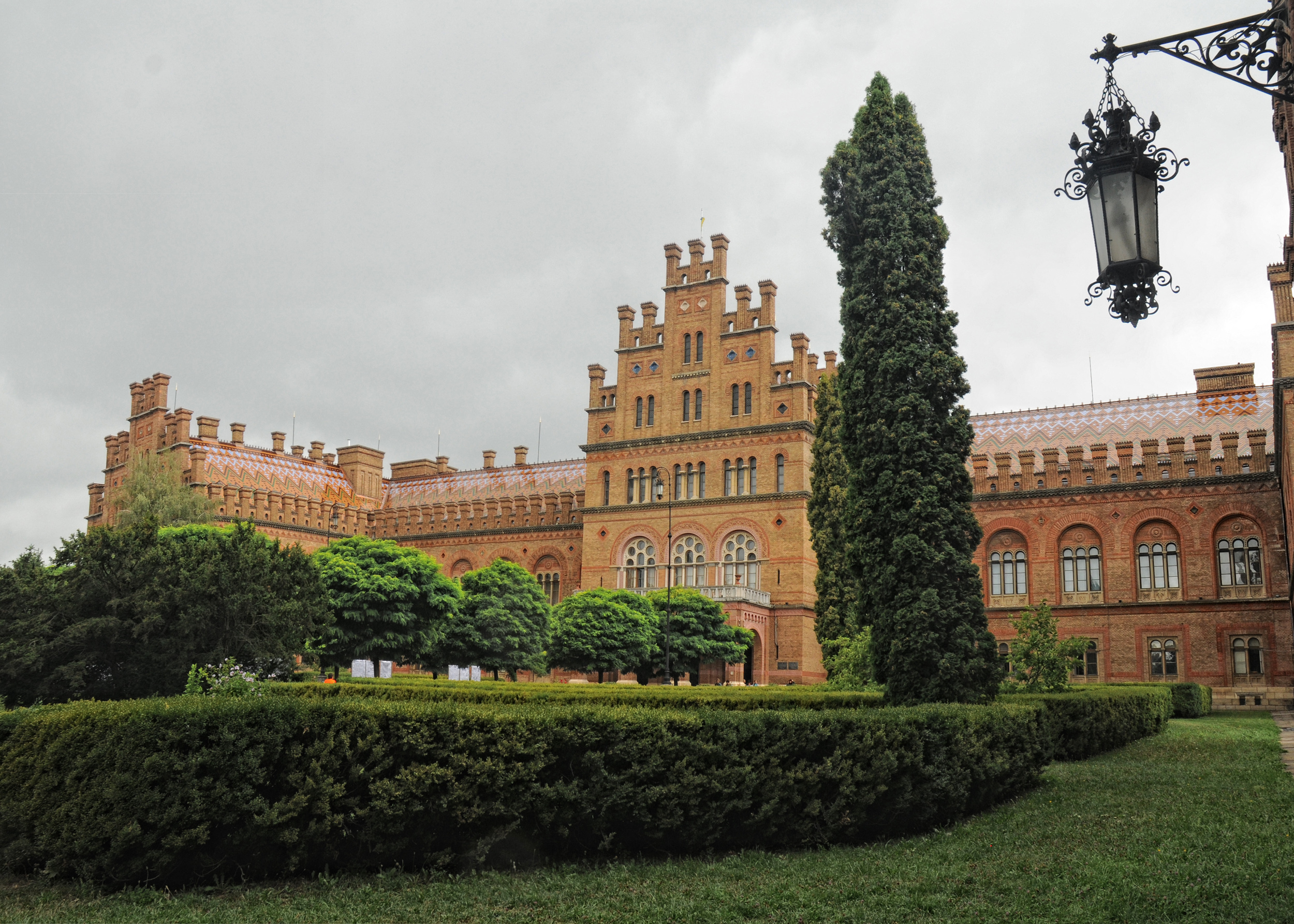 Резиденція буковинських митрополитів, Корпус митрополита